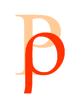 Greek letter